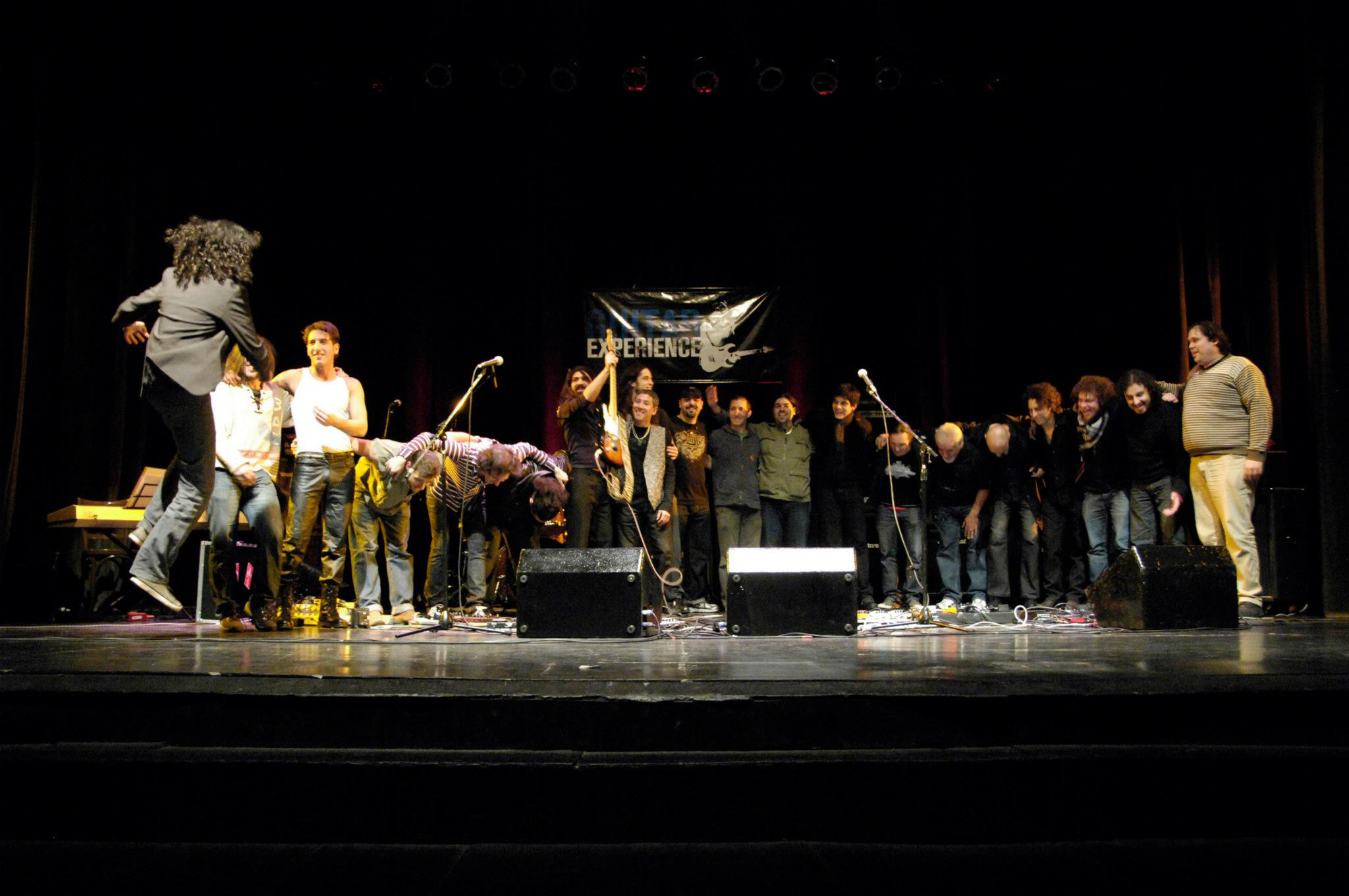 2010 Guitar Experience Festival